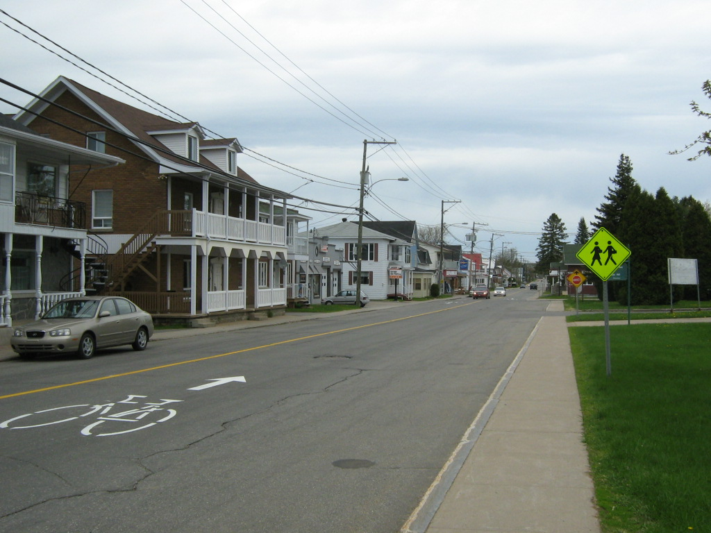 50e avenue à Sainte-Flore (Shawinigan)